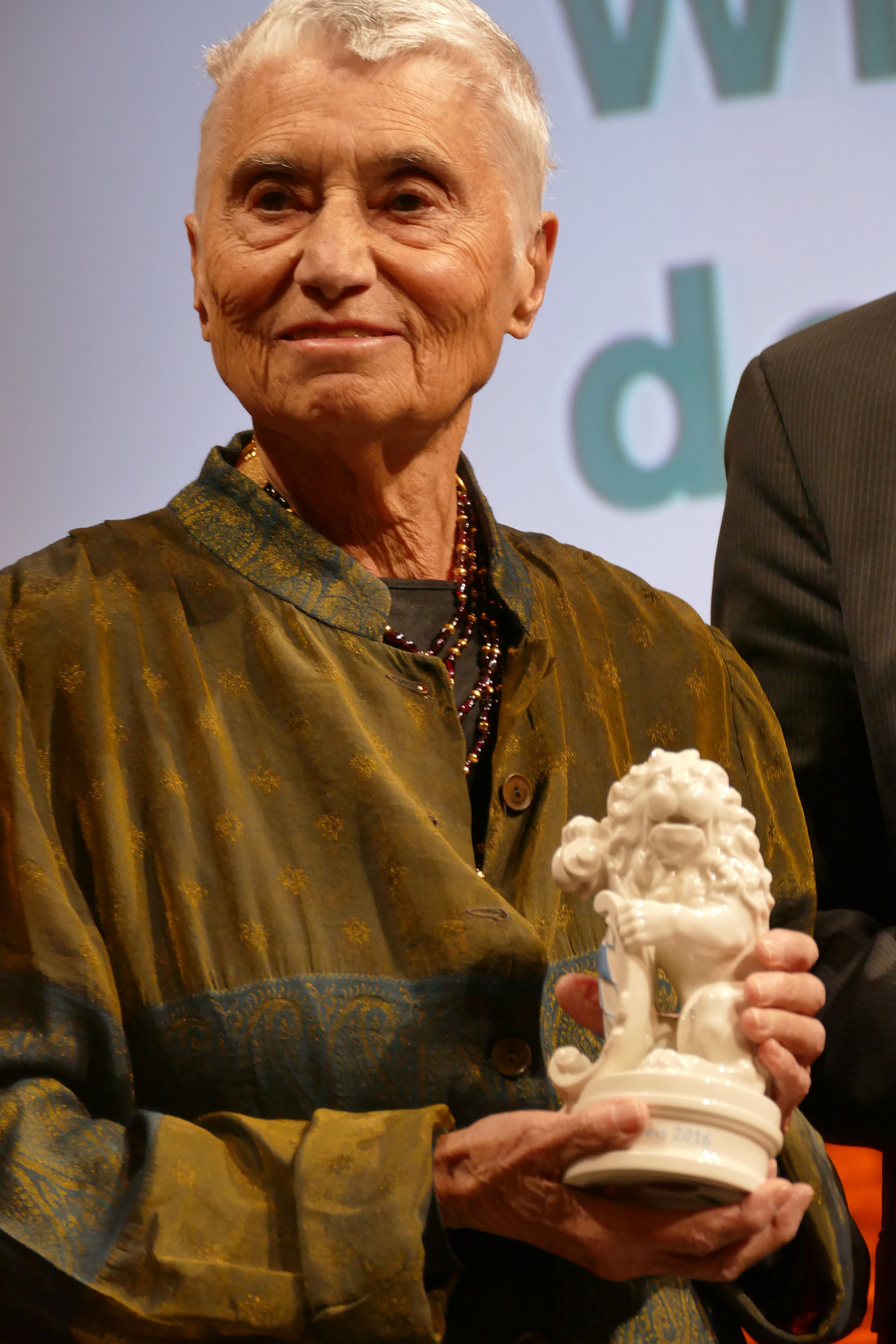 Beim Bayerischen Buchpreis 2016 wurde Ruth Klüger mit dem Ehrenpreis des Bayerischen Ministerpräsidenten für ihr Lebenswerk ausgezeichnet.